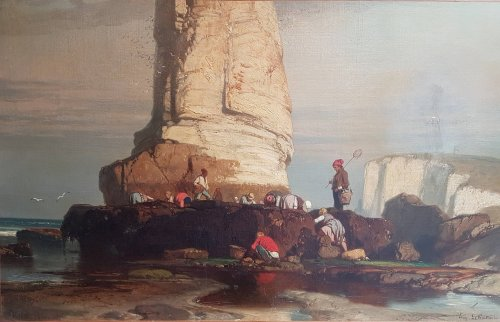 Huile sur toile - 44 x 60 cm Fécamp - Musée des Pêcheries Photo : Musée des Pêcheries